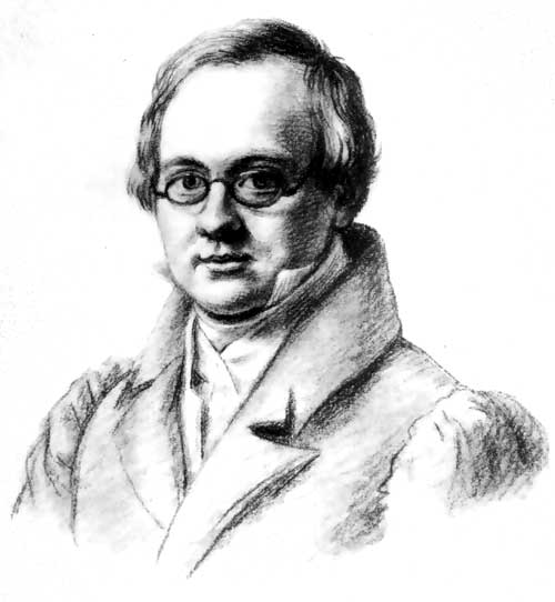 Портрет Антона Дельвига (1830 г.). Автор: Валериан Платонович Лангер (1802 — после 1865). Источник